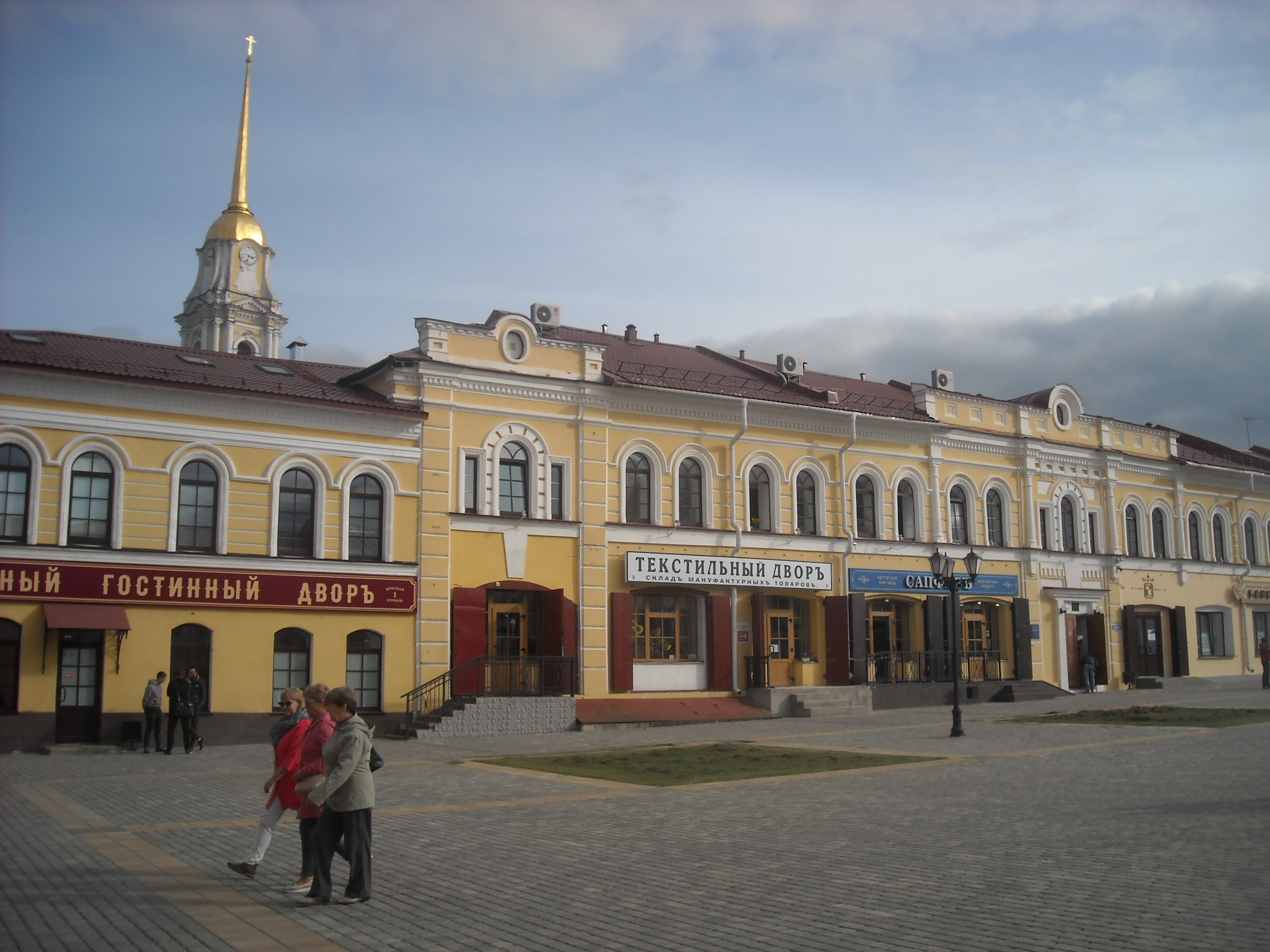 Красный Гостиный двор: улица Крестовая, 4-10, Соборная пл., 4, Волжская наб., 67-75, Красная пл., 3, Рыбинск, Ярославская область